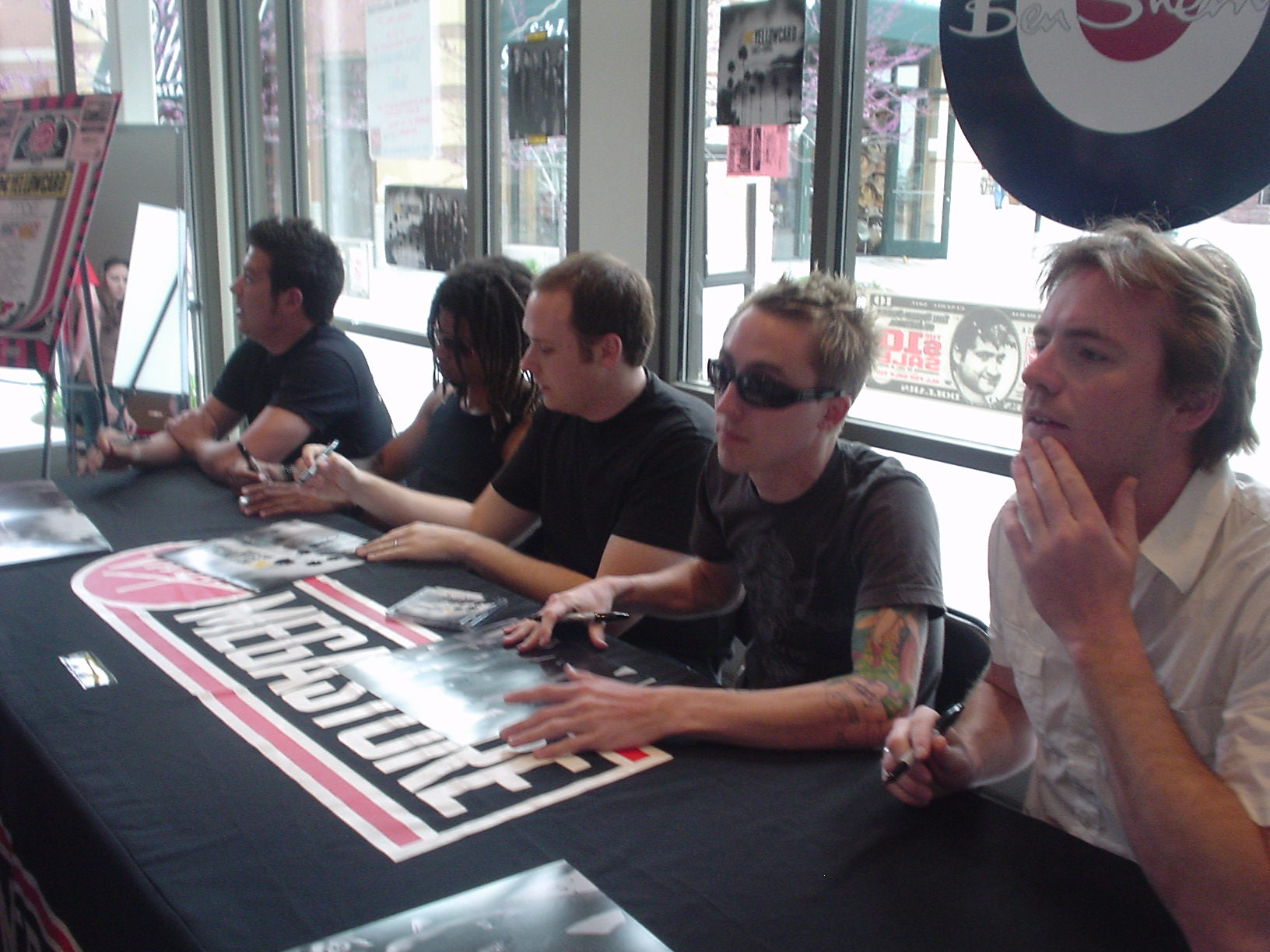 Yellowcard bei einem "meet-and-greet" im April 2006.